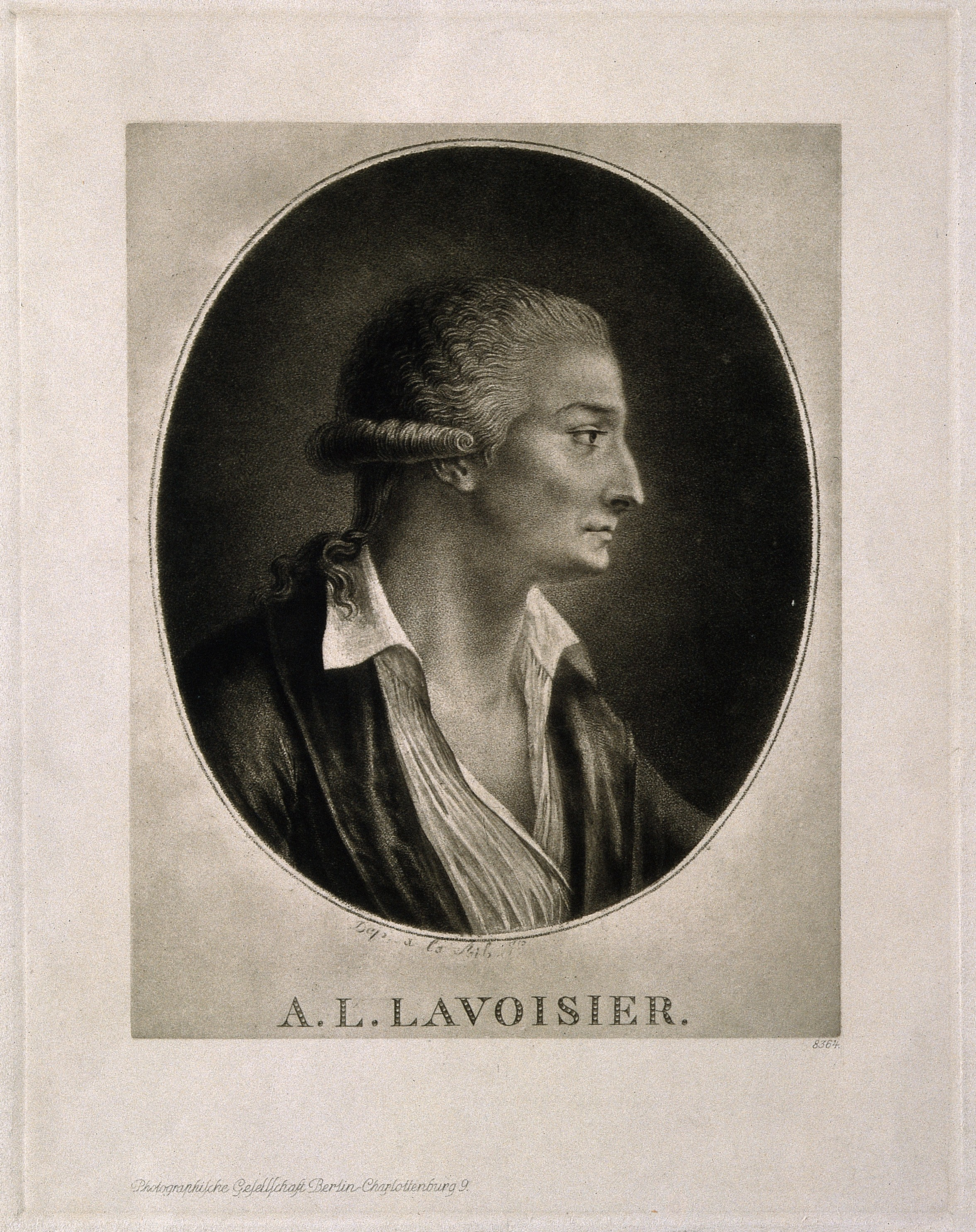 Antoine Laurent Lavoisier. Photogravure, 1954, after M. R. G. Brossard de Beaulieu, 1796. Iconographic Collections Keywords: portrait prints; Antoine-Laurent Lavoisier; photogravures